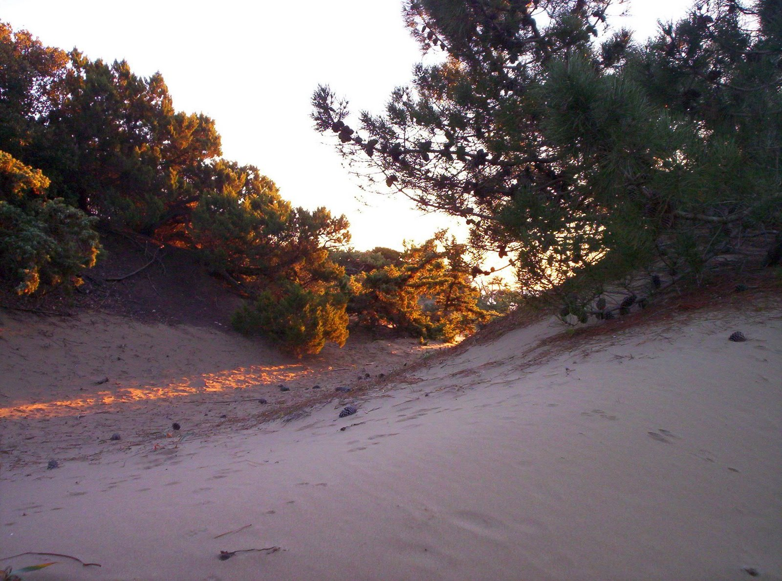 Rimigliano veduta